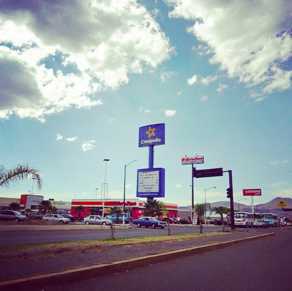 Centro Comercial Galerías Metropolitana en Uriangato, Gto.